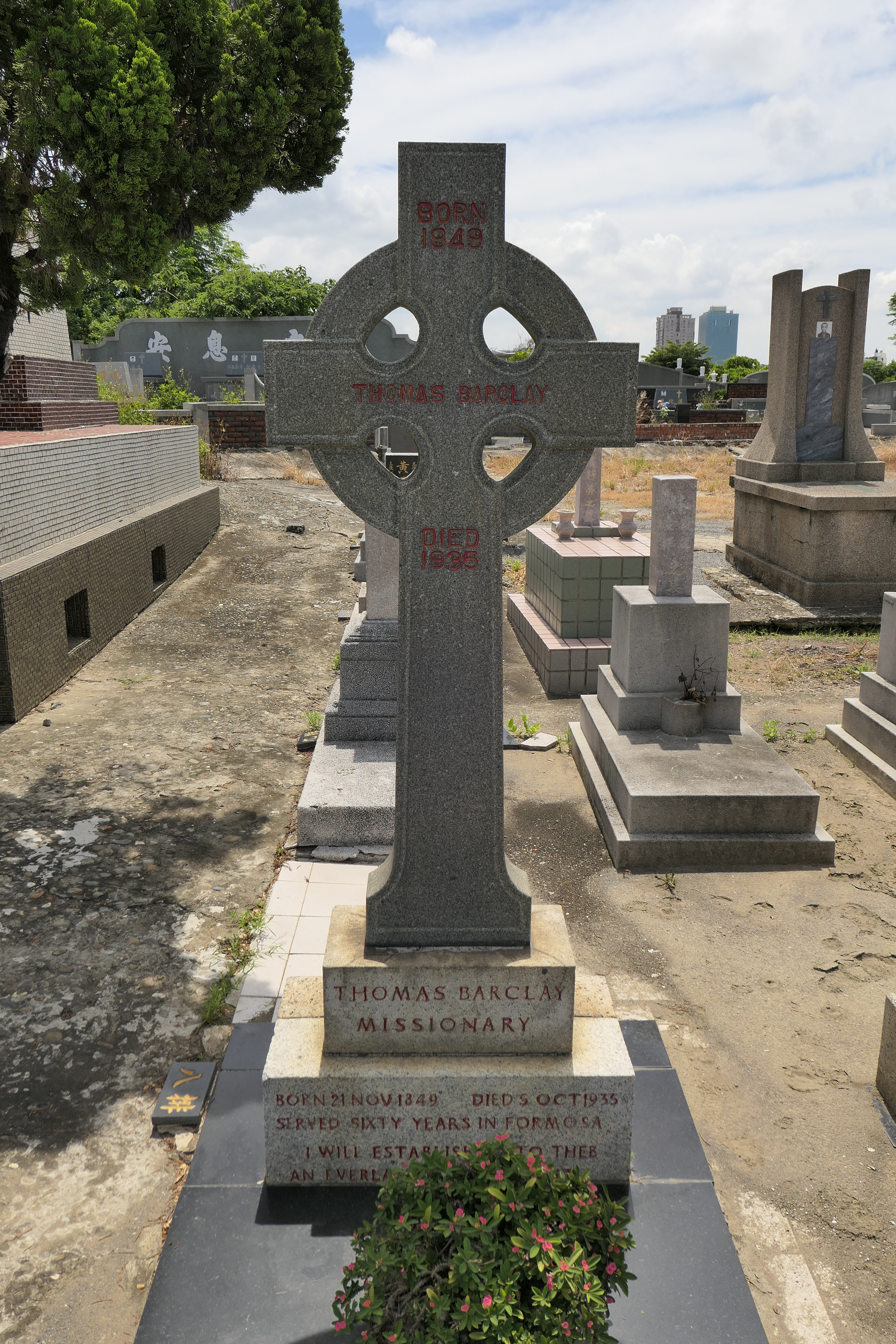 中文（台灣）: 巴克禮墓，位在基督教墓地